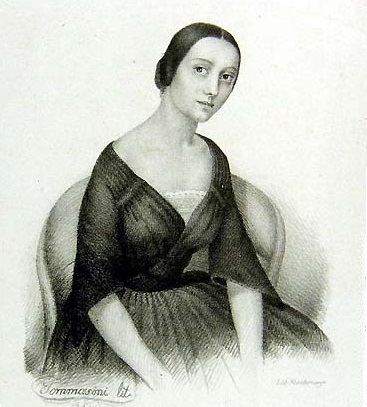 Laura Bon (1825-1904), litografia, Museo centrale del Risorgimento, Roma